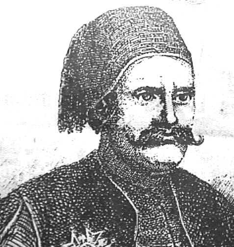 Retrato del coronel Sève, también conocido como Solimán Pachá.